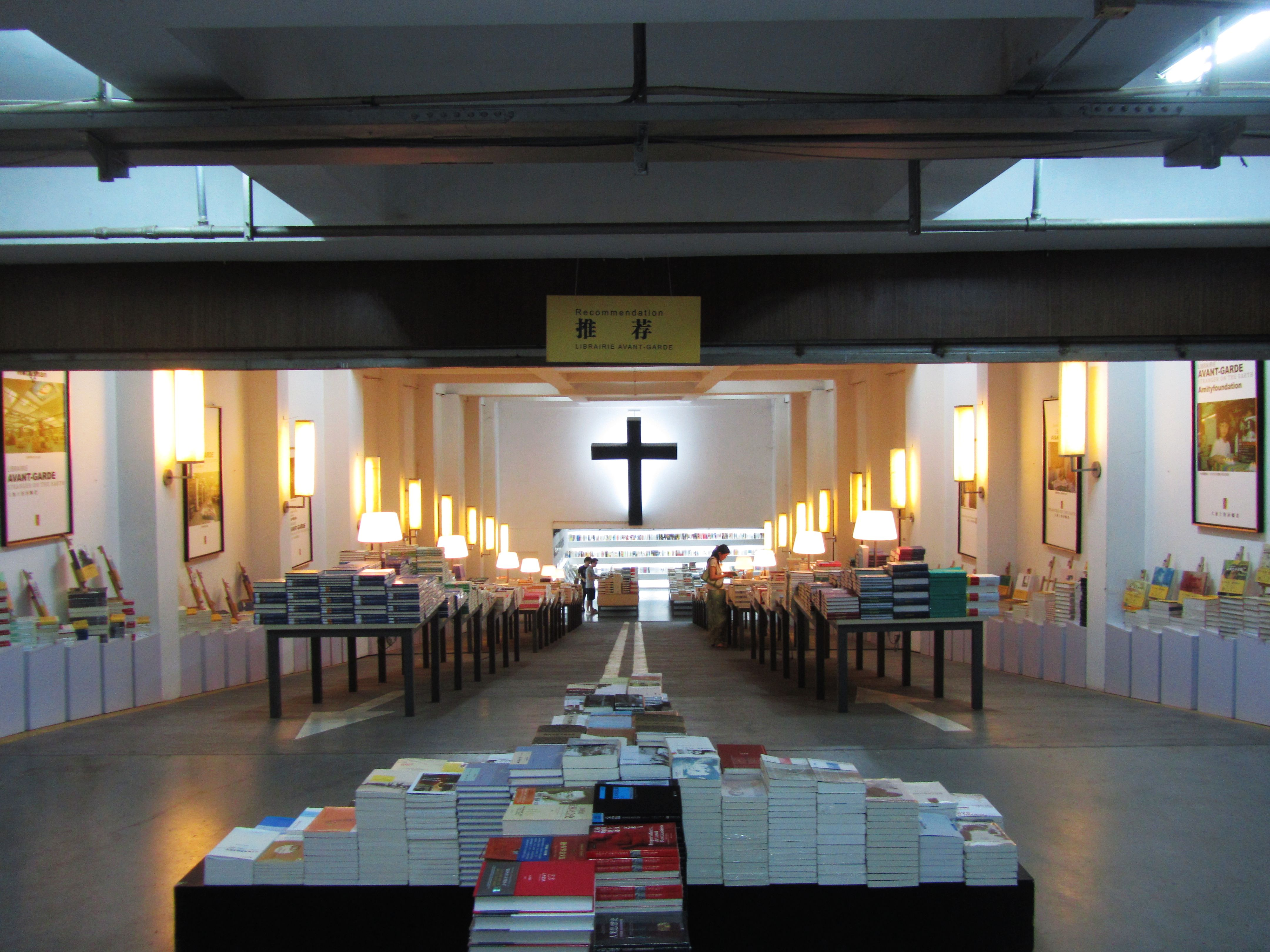 南京先锋书店五台山店室内。